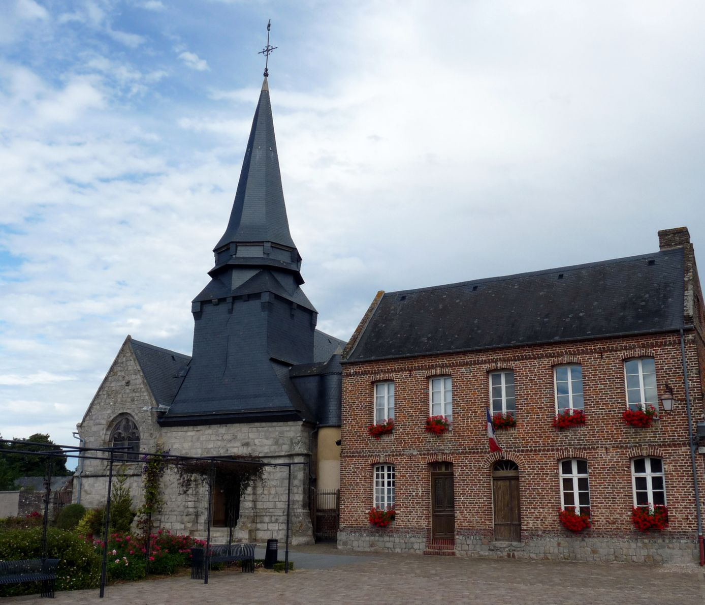 Eglise d'Ambrumesnil; à droite: la mairie